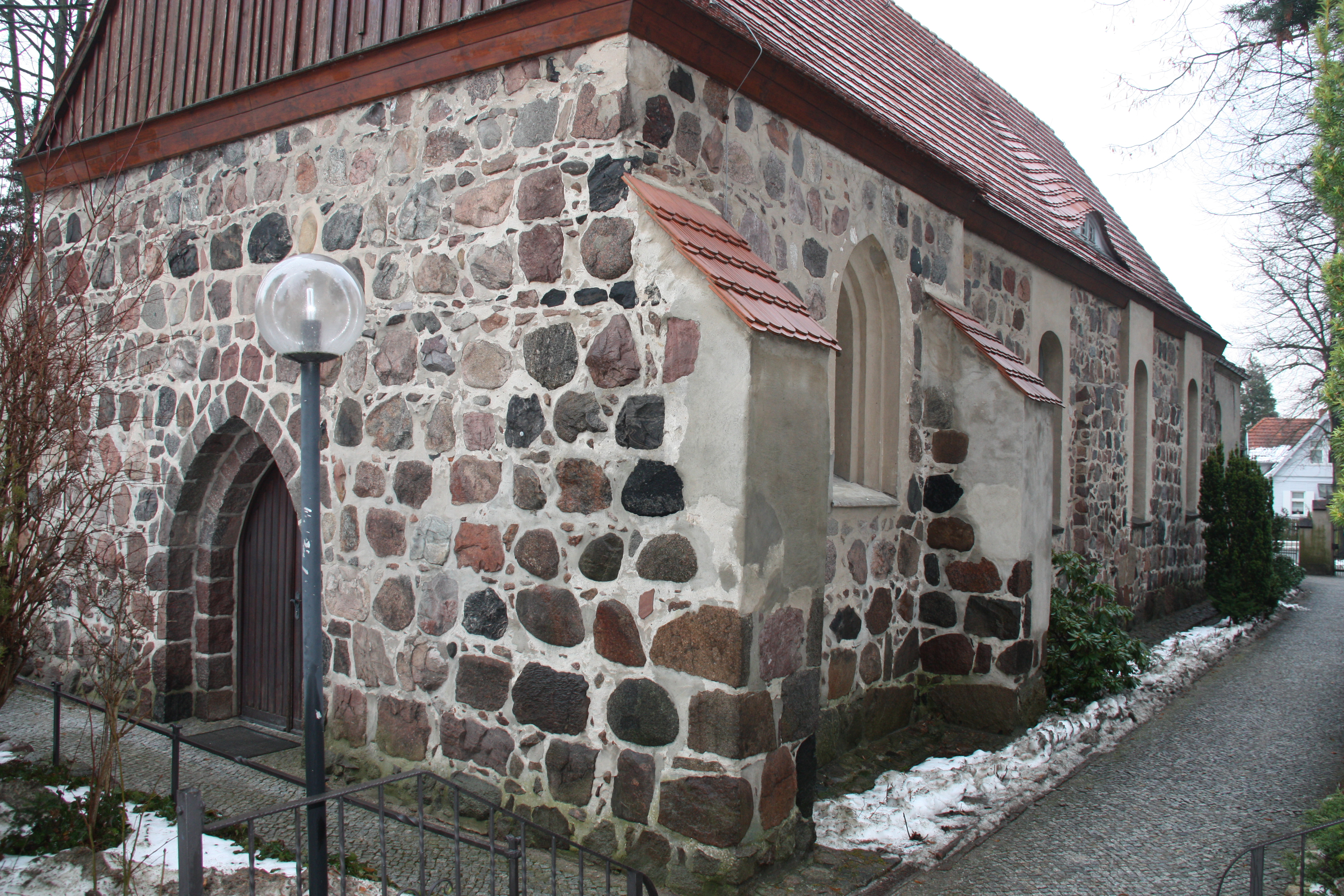 Das Feldsteinmauerwerk der Dorfkirche Gatow von Südwesten: Turmbereich (mit Strebepfeilern), er ist weniger sorgfältig gequadert, die Fugen mussten ausgezwickt werden. Im Hintergrund ist der sorgfältiger gequaderte Ostteil der Dorfkirche zu sehen (regelmäßige Schichten).